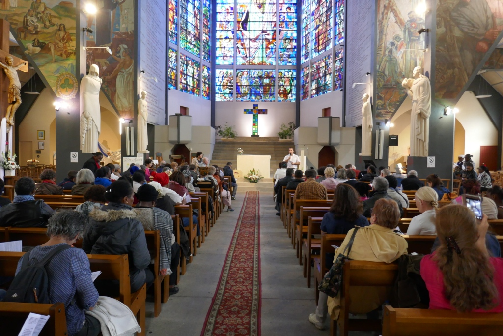 Départ du pèlerinage de la fête de saint Denis 2019 depuis Epinay-sur-Seine jusqu'à la basilique cathédrale saint Denis pour les catholiques du diocèse (13 octobre)